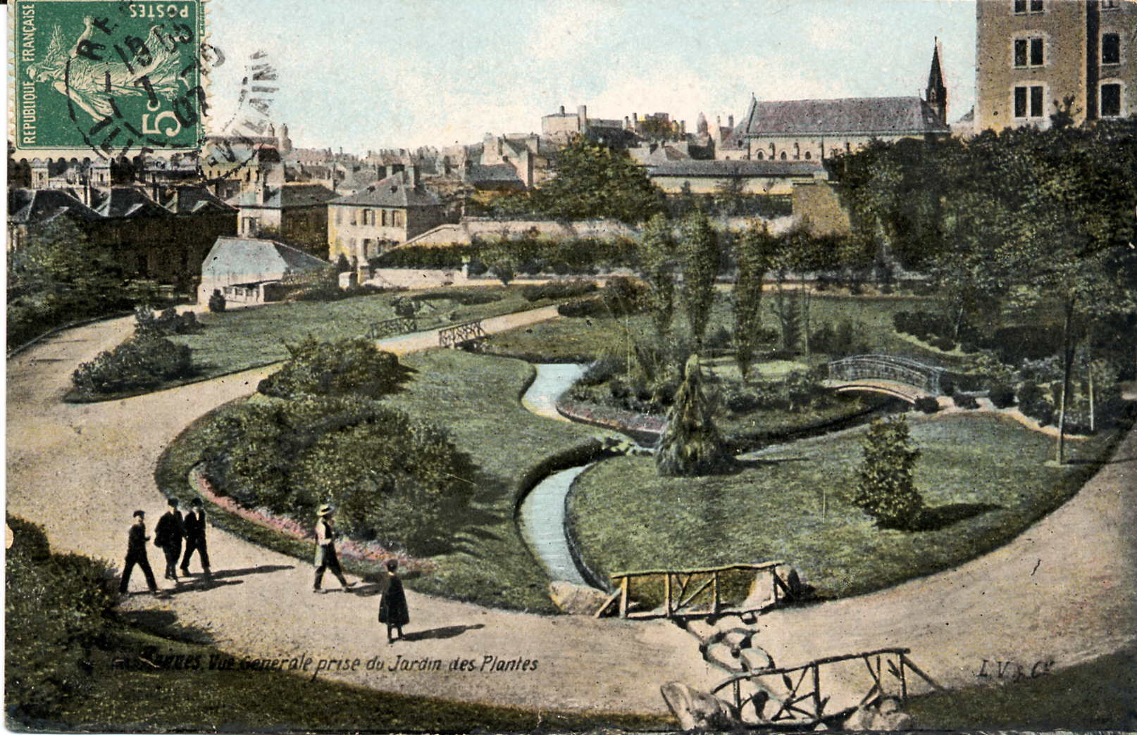 Carte postale colorisée du Jardin des plantes de Rennes (parc du Thabor). Le tampon de la poste est daté de 1907. Archives municipales de Rennes, 100 Fi 557.